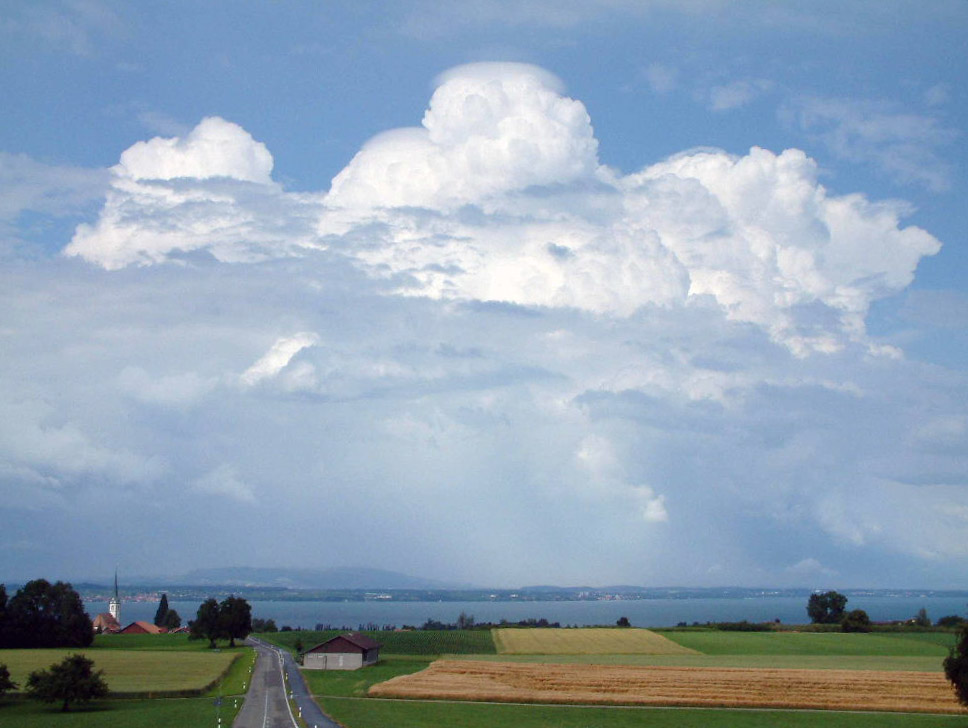 Gewitterwolke einer Superzelle über Friedrichshafen(D) am Bodensee, aufgenommen in Altnau(CH).